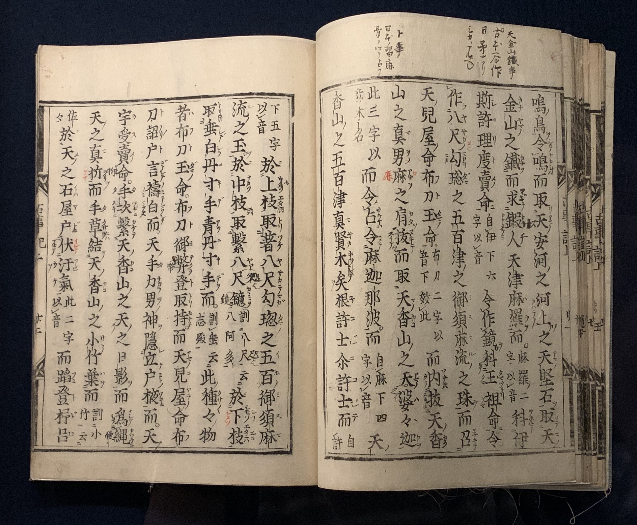 寛永版本 古事記 國學院大學古事記学センター蔵 太安萬侶 撰録 寛永21（1647）年刊 寛永21年に刊行された古事記最初の版本。画像の本には「寛永廿一［甲申］歳孟夏吉辰/二條通観音町風月宗智刊行」とあり、この「風月版」が初版と見られる。 國學院大學博物館企画展示の撮影可能資料。